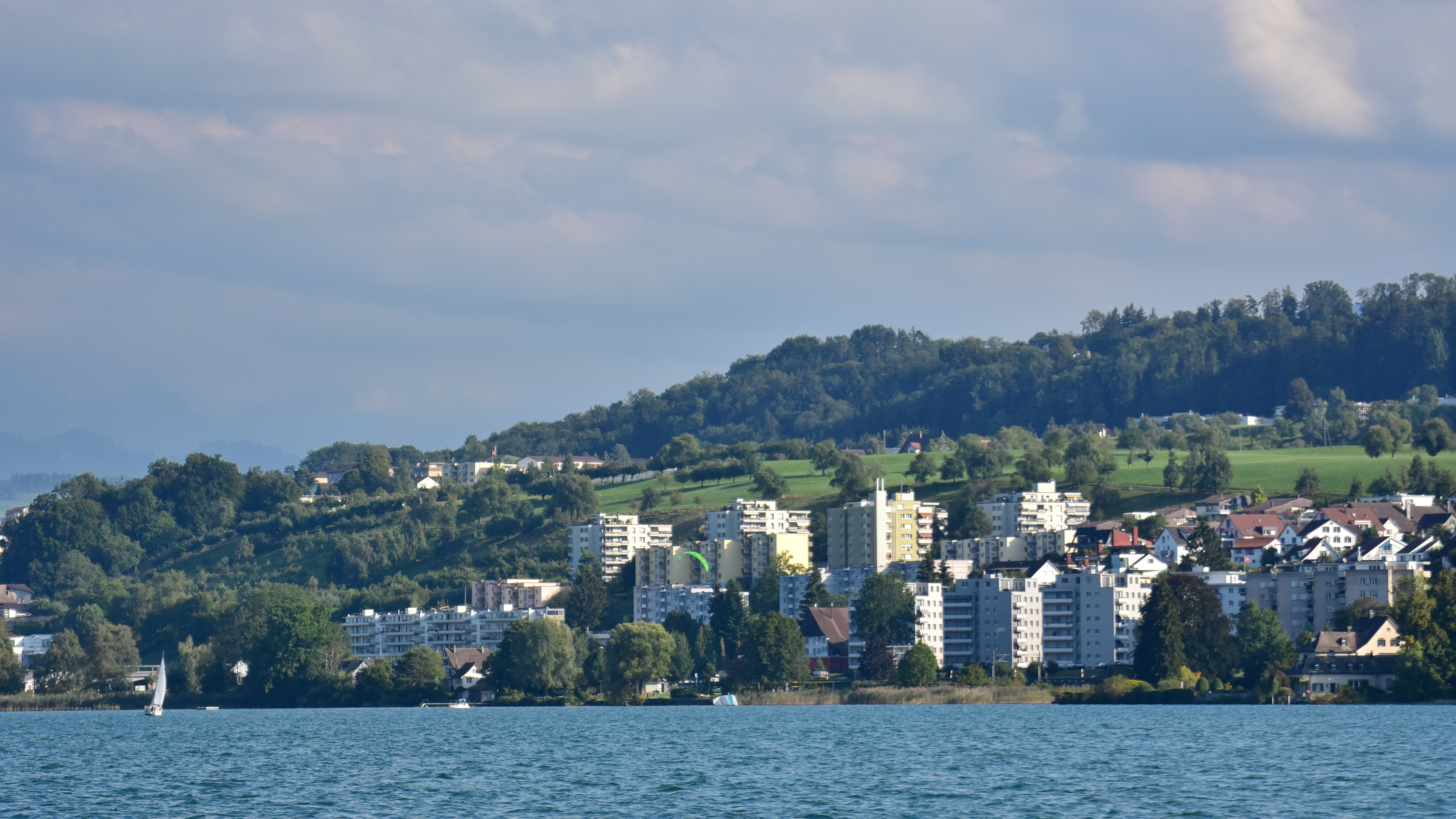 Au peninsula and Au as seen from Zürichsee-Schiffahrtsgesellschaft (ZSG) ship MS Helvetia on Zürichsee in Switzerland